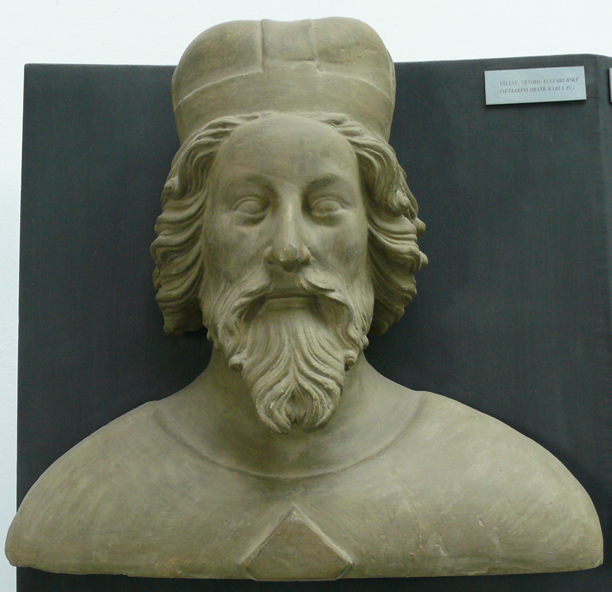 Václav Lucemburský